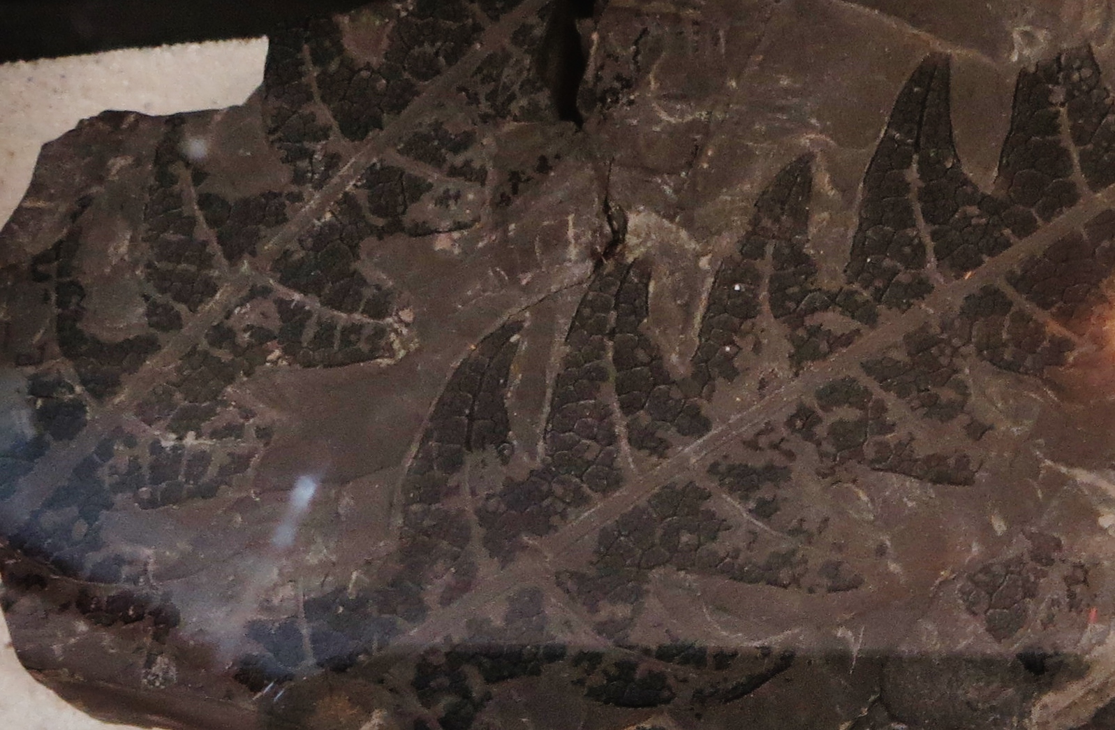 Fossil of plant - Took the picture at Natural History Museum, Bonn University